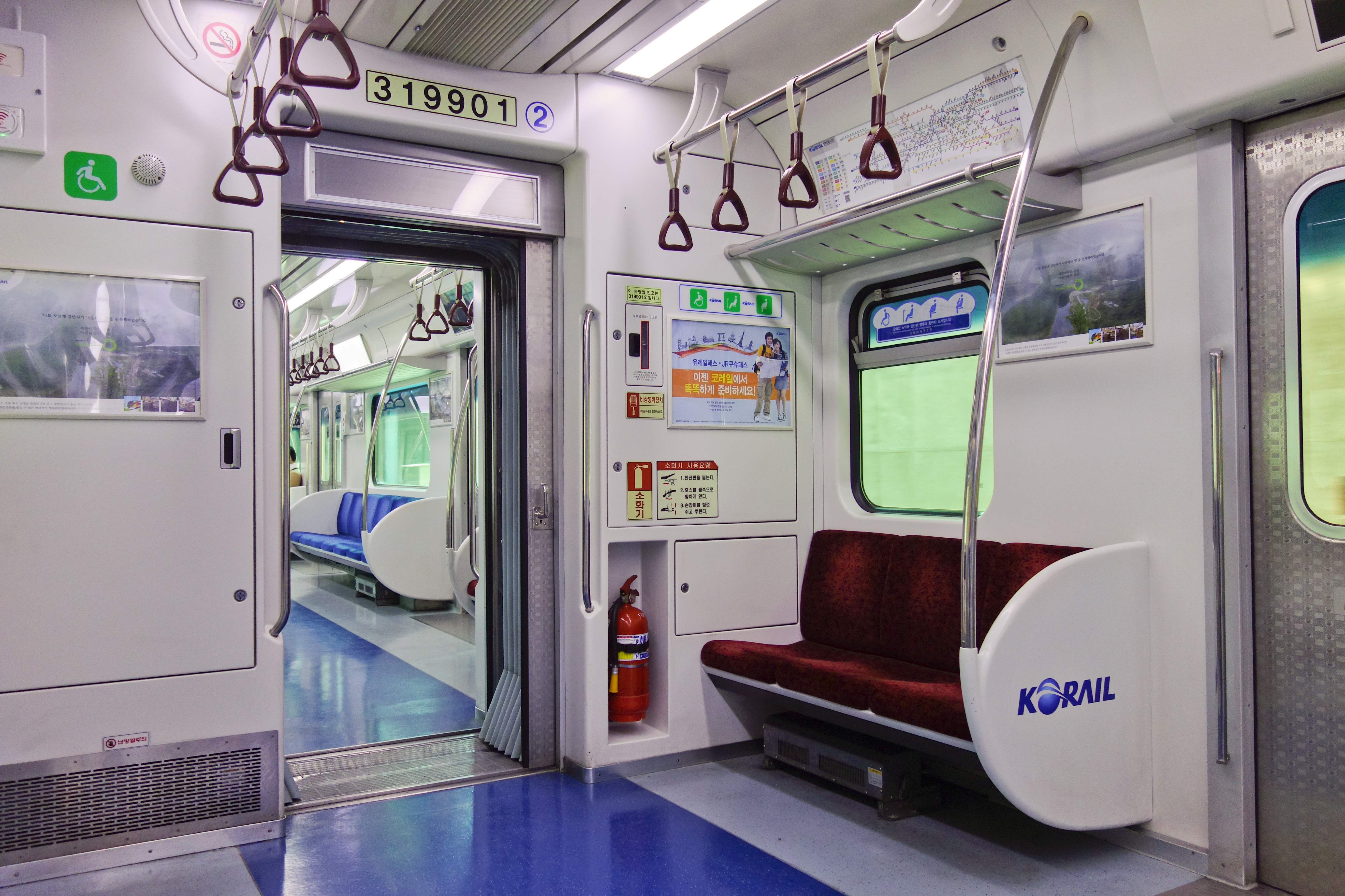 KORAIL 319000系 319901車内（車端部）